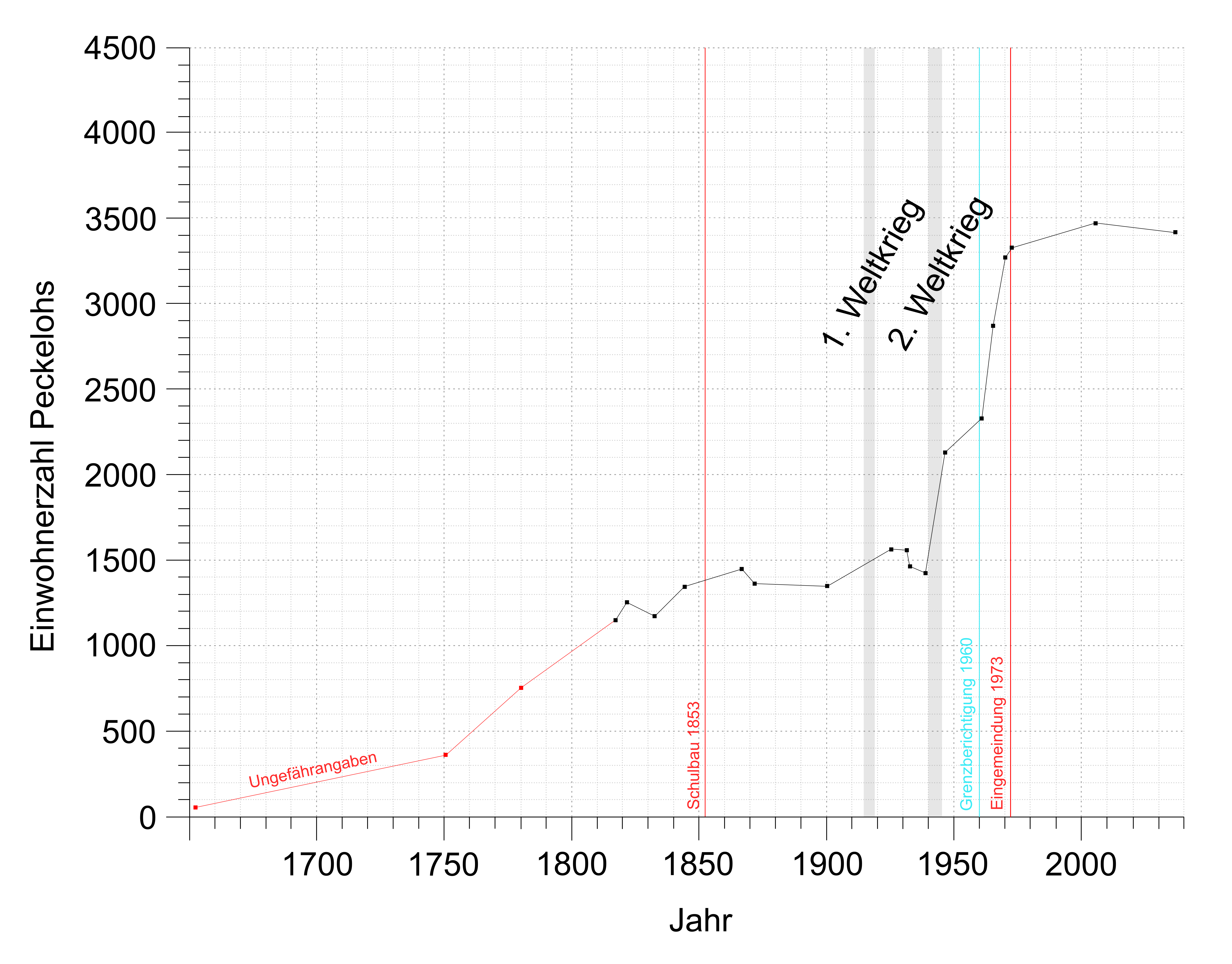 Die Graphik stellt den Bevölkerungswachstum, sowie die Bevölkerungsabnahme Peckelohs in den letzen Jahrhunderten dar (Stand: Dezember 2017).